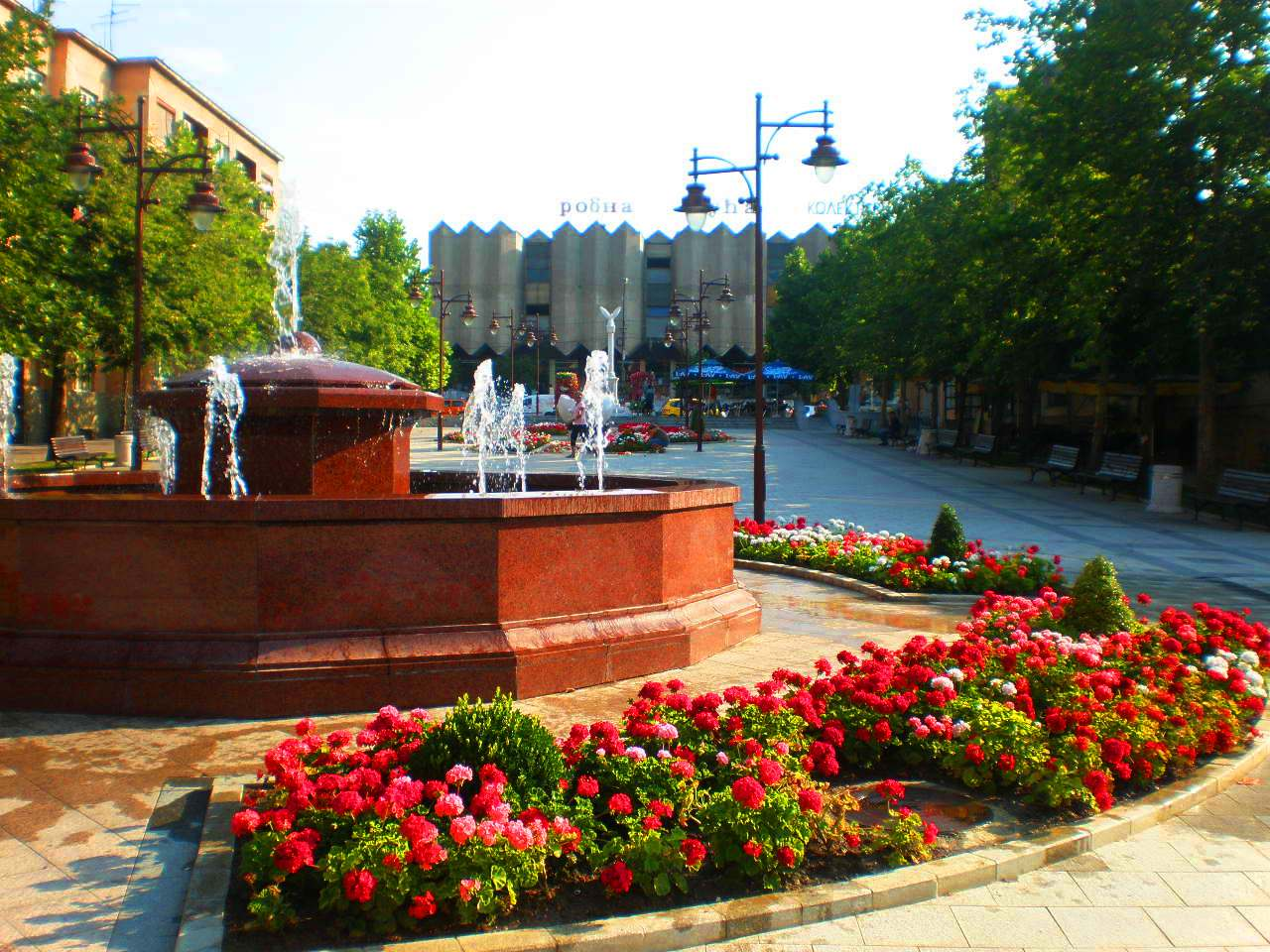 Aranđelovački trg